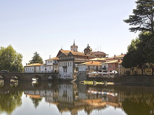 Madalena (Chaves - Portugal)